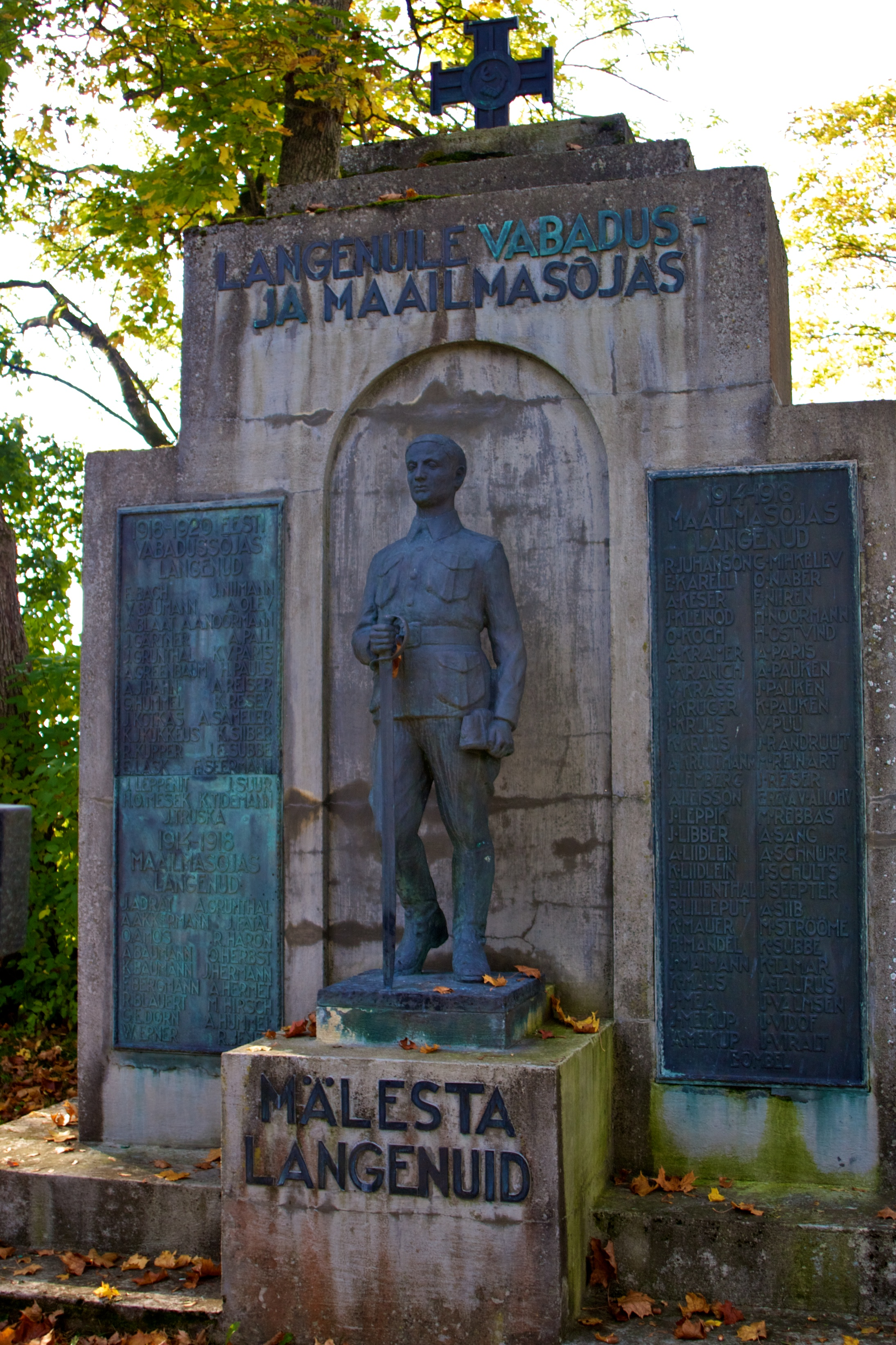 Järva-Peetri Vabadussõja mälestussammas